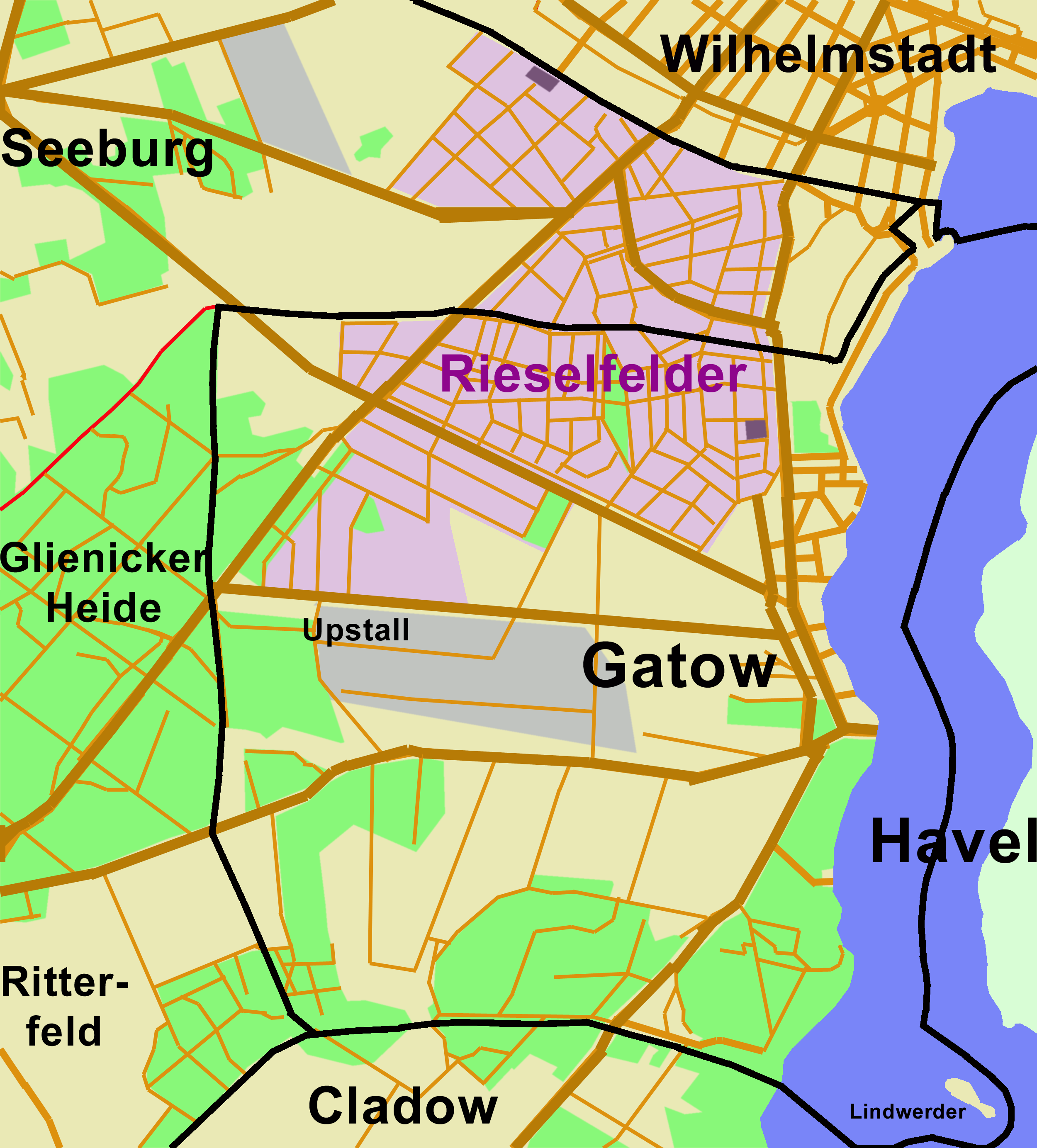 Straßensystem von Berlin-Gatow um 1922, gestaltet nach der Übersichtskarte im Berliner Adressbuch 1922.